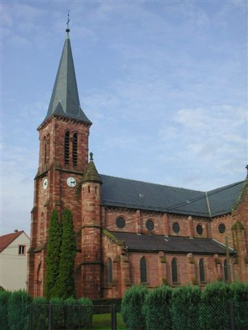 église de Haspelschiedt